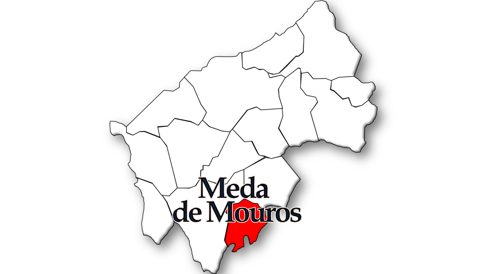 População